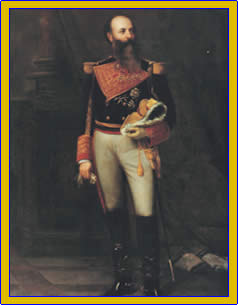 Antonio Guzman Blanco. presidente de Venezuela. militar.